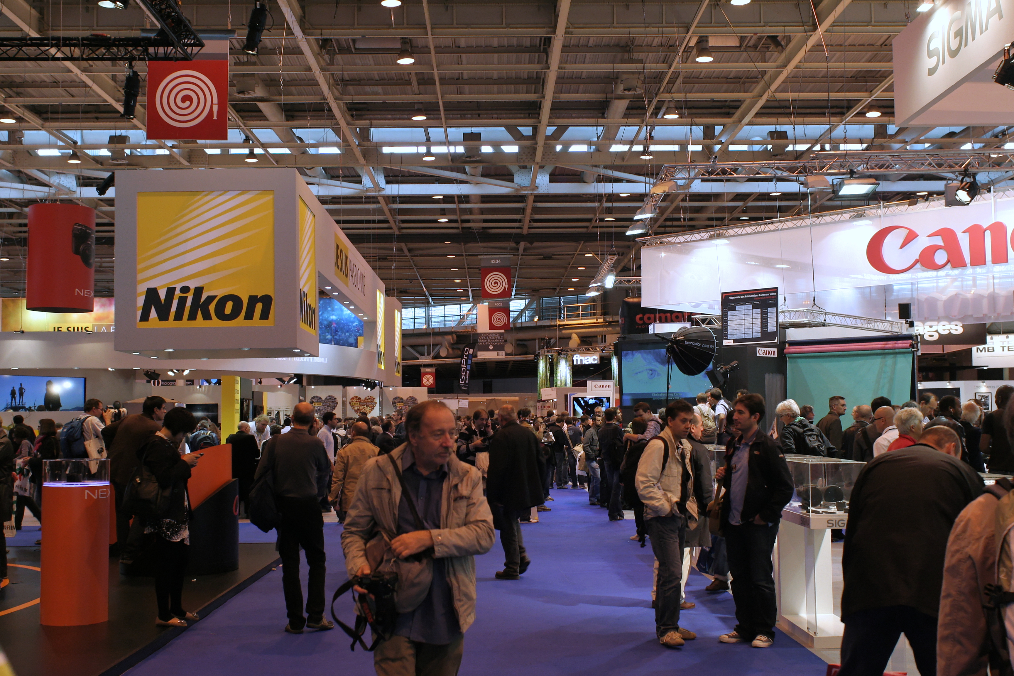 Salon de la photo de Paris 2011, porte de Versailles. Stands Nikon (à gauche) et Canon (à droite).